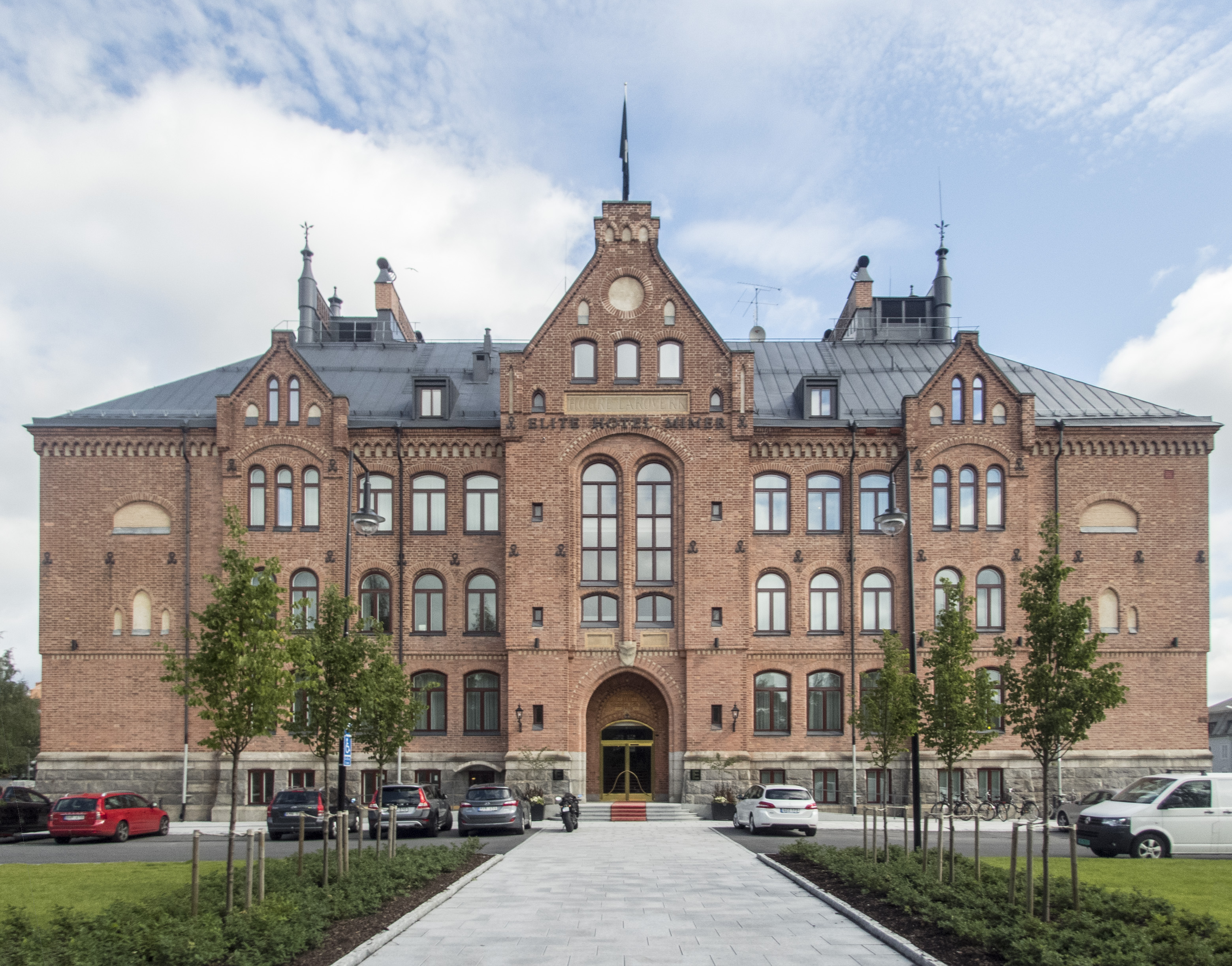 Elite Hotel Mimer, Umeå. F d Högre Allmänna Läroverket, Mimerskolan. Byggnadsår 1898–1900. Arkitekt Johan Nordqvist